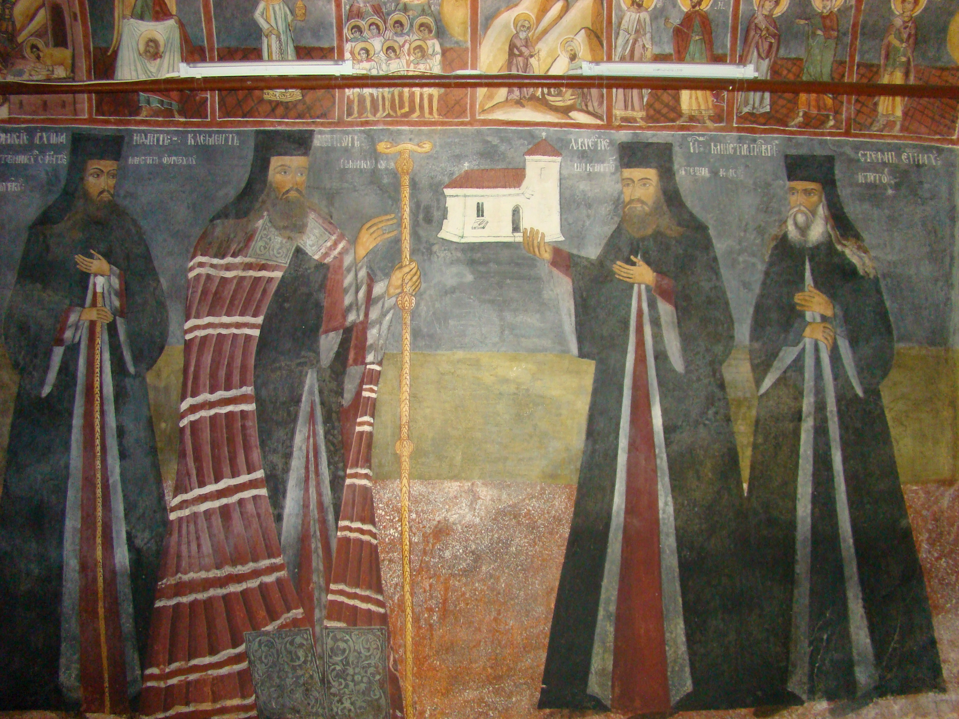 Bolnița Sf.Nicolae, Mănăstirea Polovragi, județul Gorj